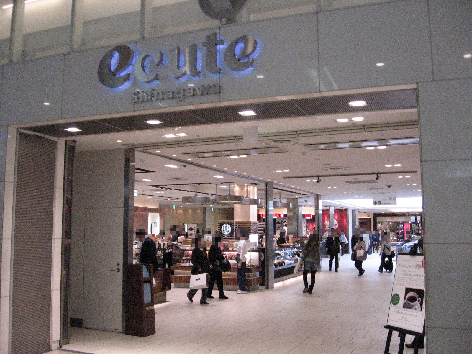 JR品川駅エキナカ「ecute（エキュート）品川」